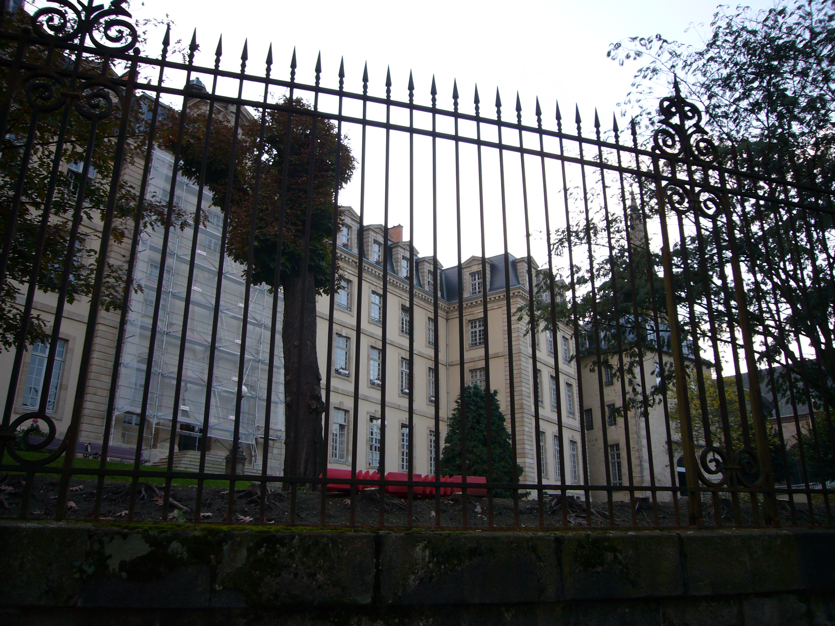 Lycée Gay-Lussac de Limoges